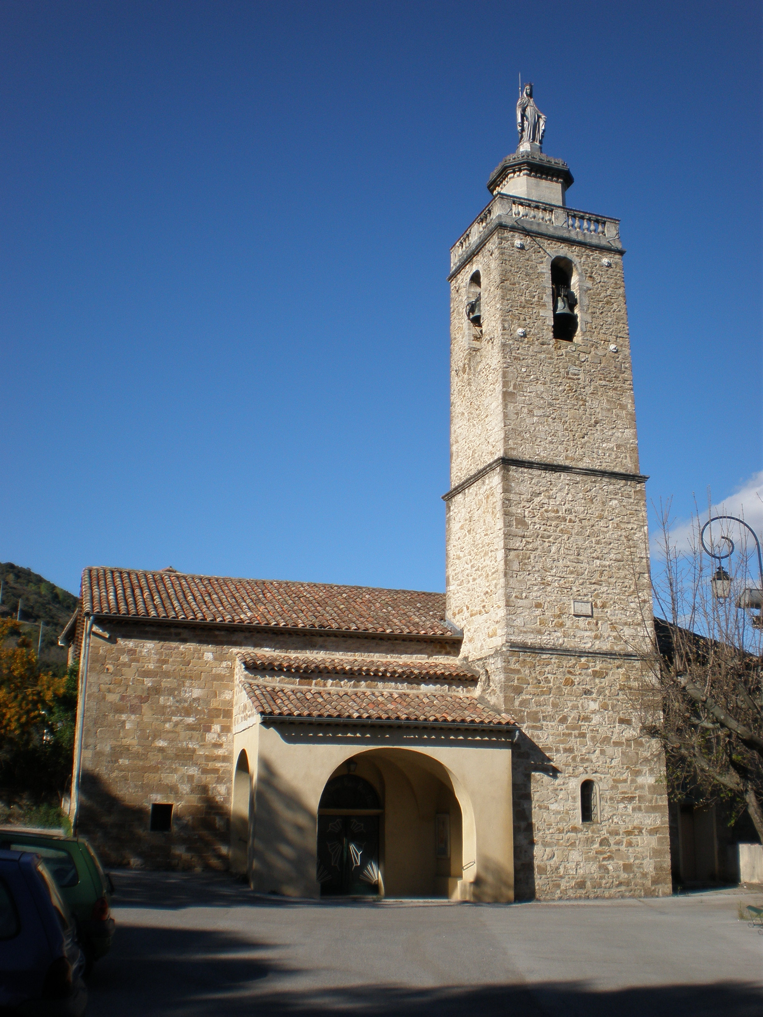 Église du sanctuaire Notre-Dame de Laval-Pradel (Gard)